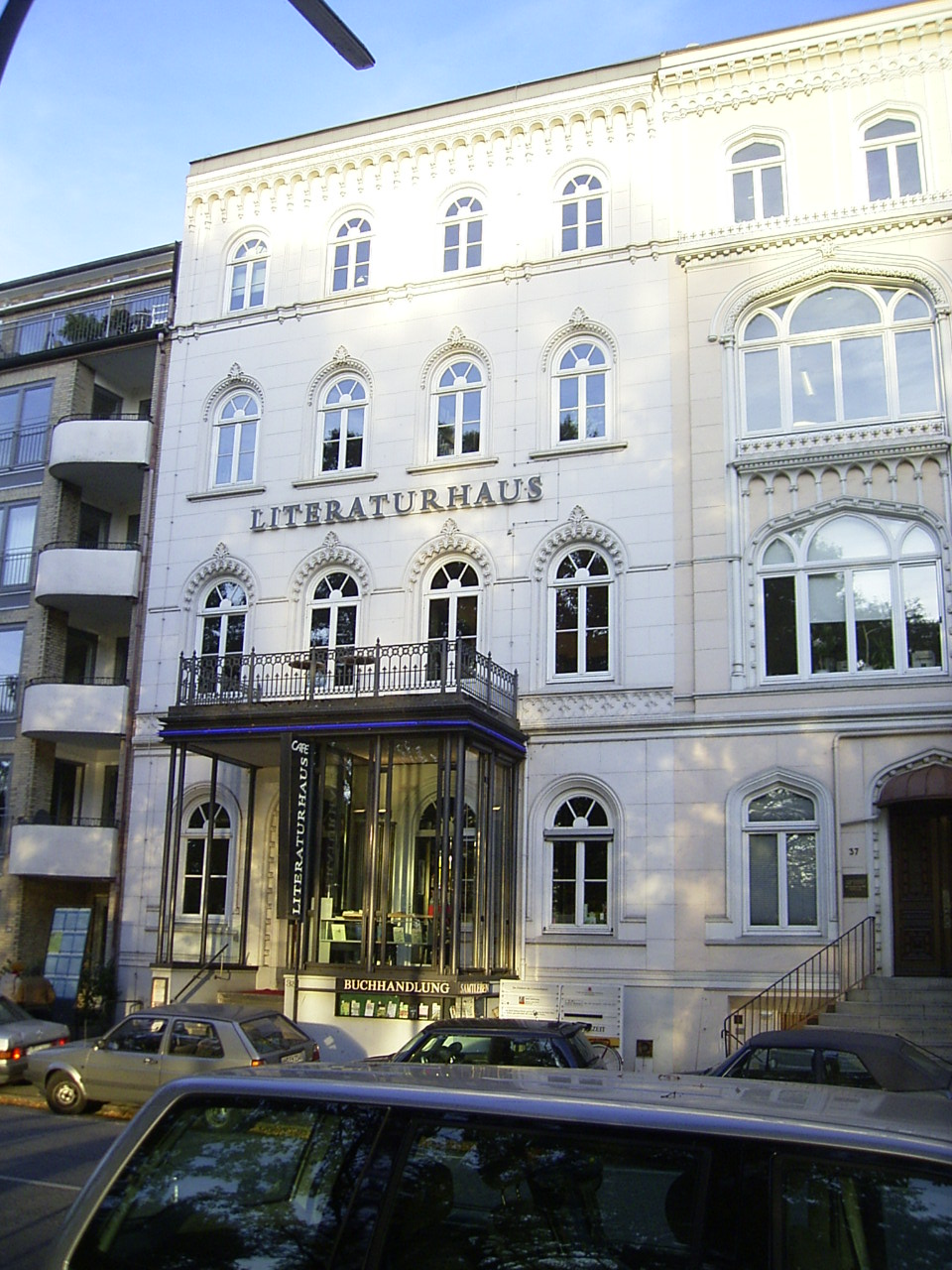 Der Bau Schwanenwik 38 auf der Uhlenhorst wurde 1867/68 nach Plänen von Jean-David Jollasse erbaut. Nach diversen unterschiedlichen Nutzngen wurde es 1988/89 durch das Architekturbüro Schramm, v. Bassewitz, Hupertz & Partner restauriert und dient seither dem Literaturhaus Hamburg als Heimstatt.